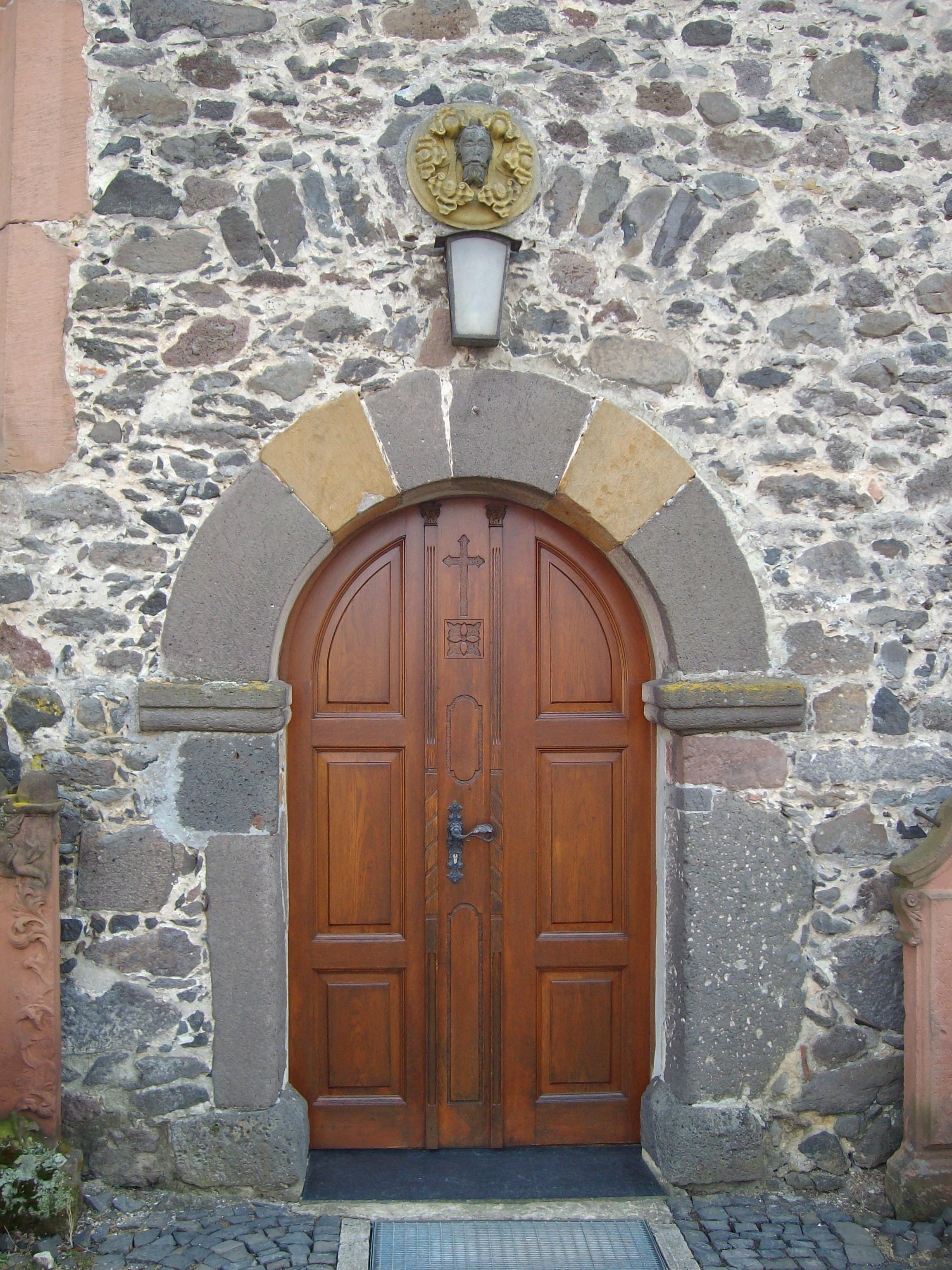 Nordportal der Kirche in Grüningen, Pohlheim, Hessen, Deutschland